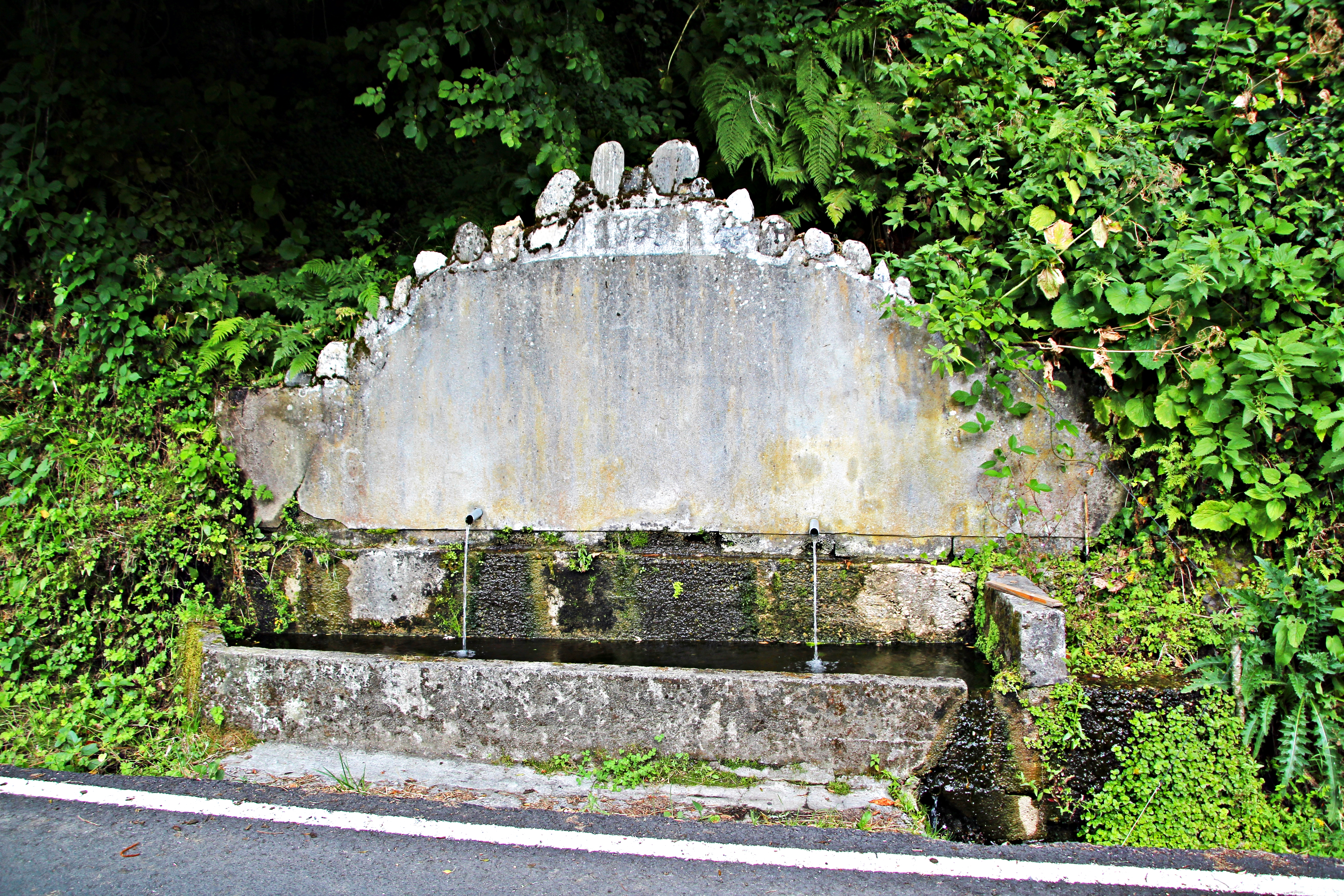 Barjas, comarca de El Bierzo, provincia de León